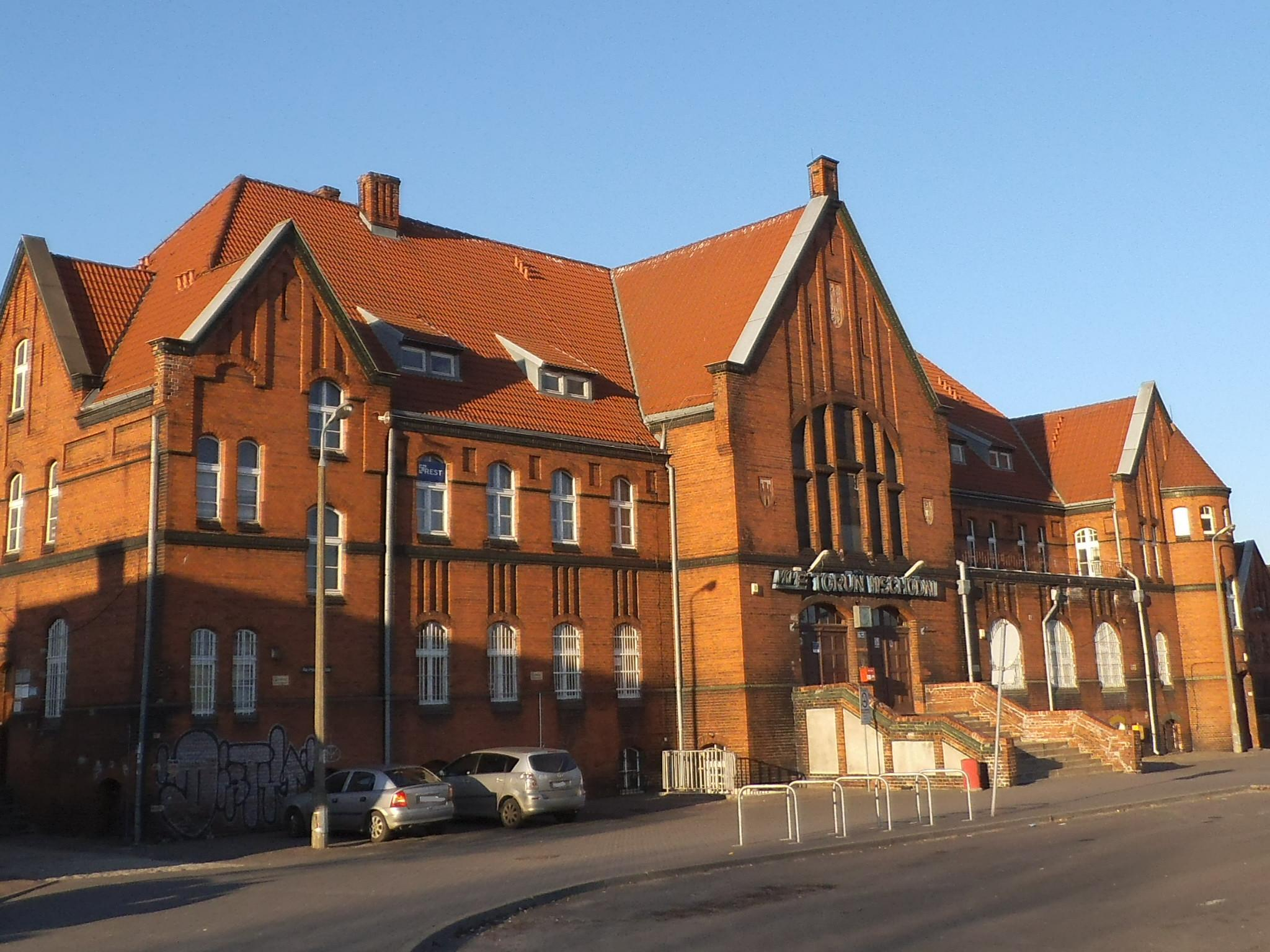 Dworzec Toruń Wschodni